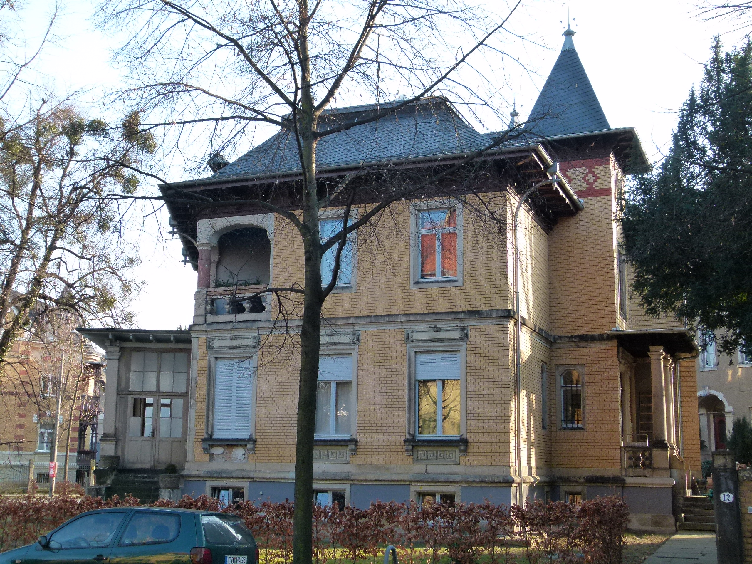 Denkmalgeschütztes Haus, Gustav-Adolf-Straße 12, Strehlen, Dresden